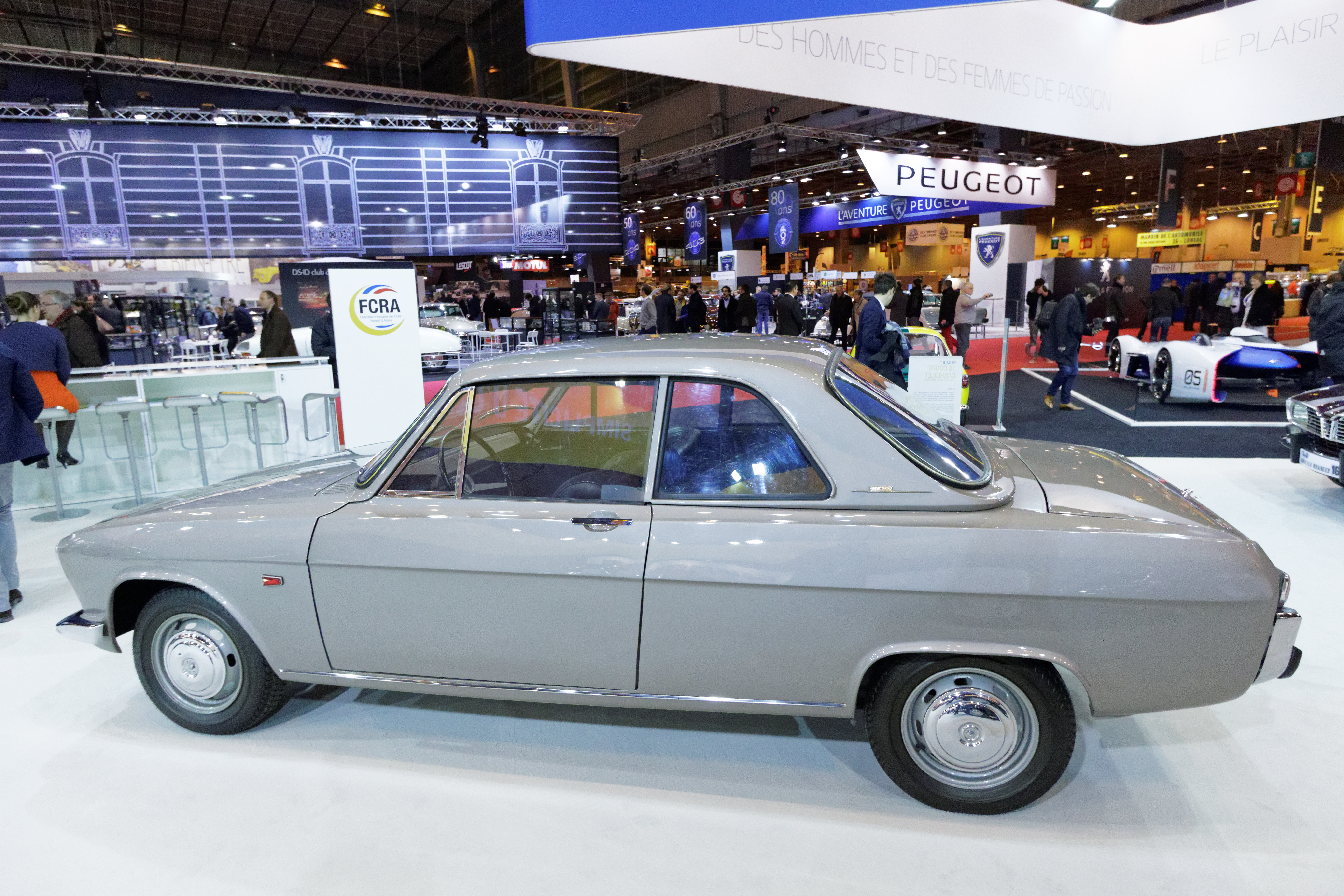 Une des voiture présentée lors du salon Rétromobile de Paris 2015